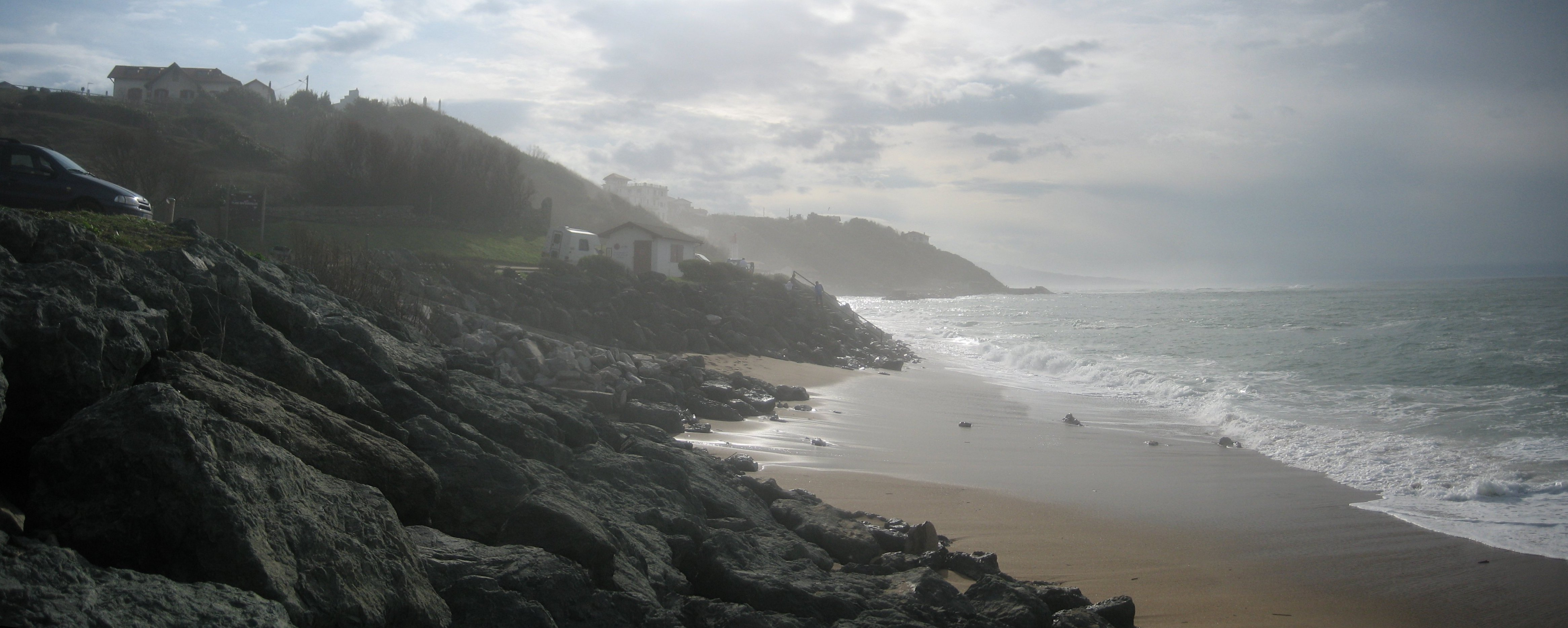 Panoramique depuis les rochers de Parlementia du Samedi 2 Mars 2007